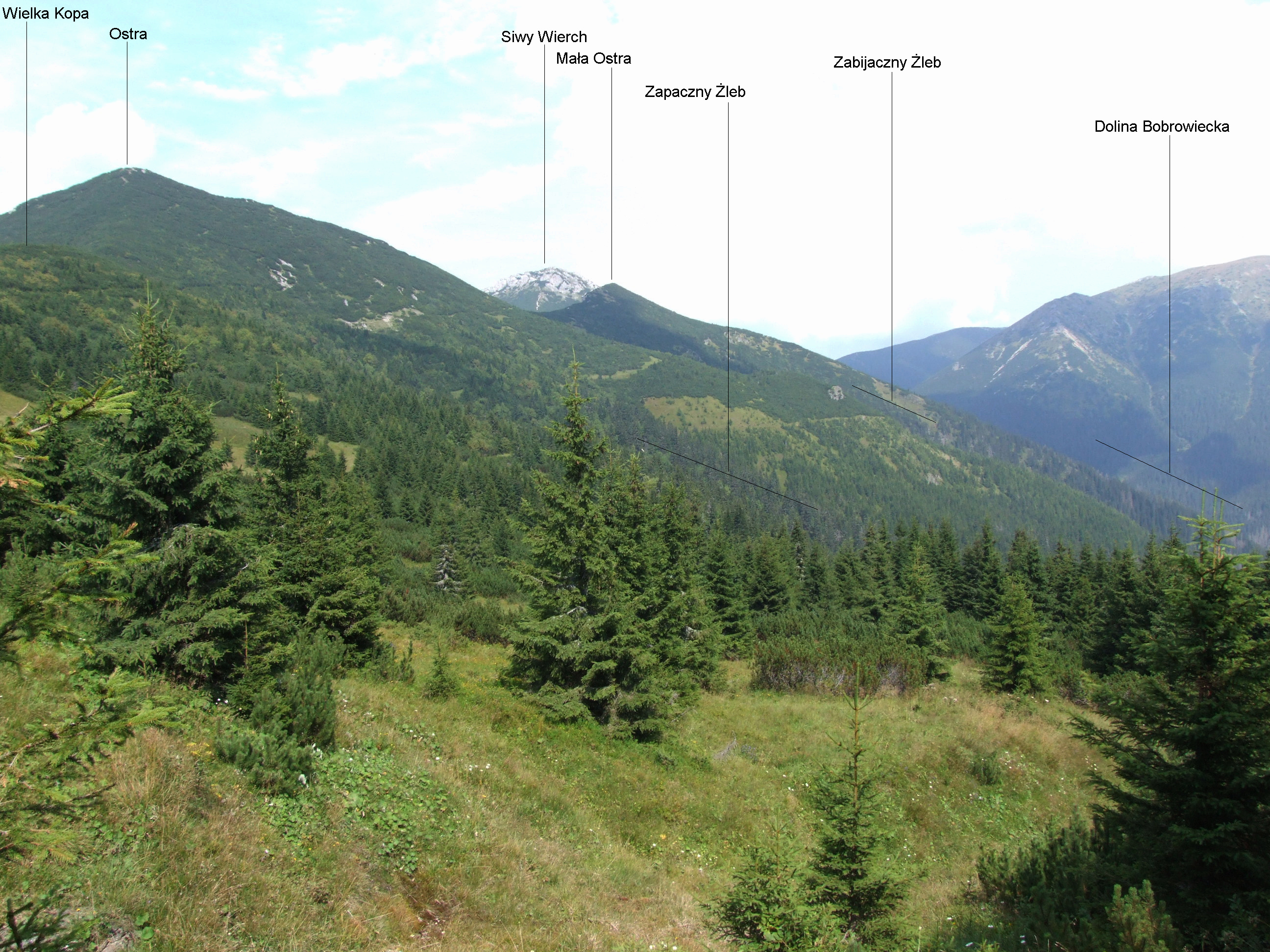 Widok z okolic Babkowej Przehyby